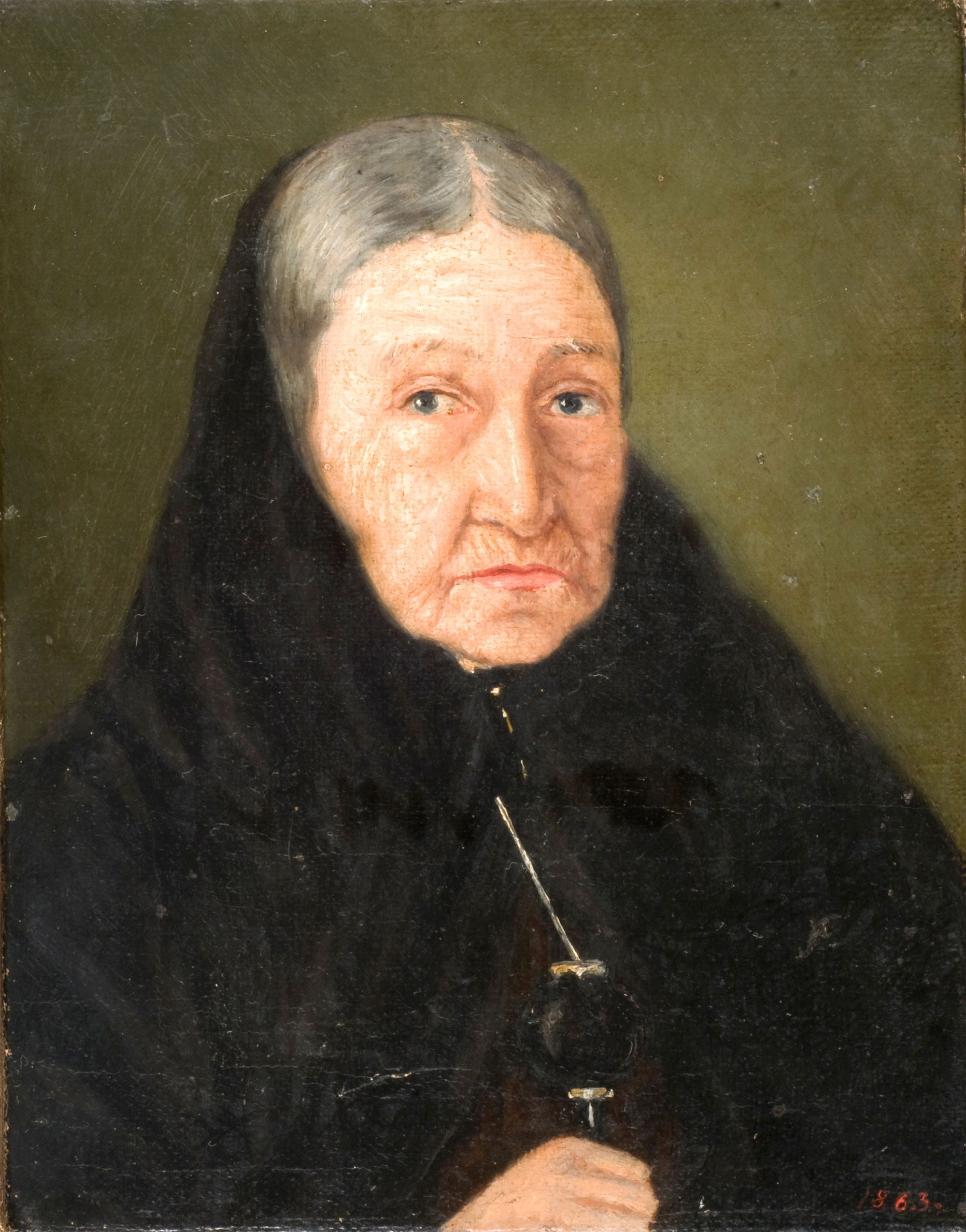 Fermín Rezábal Bustillo, Retrato de Señora. 1863. 20 x 15,5 cm, óleo sobre tela. Inv. 1900.